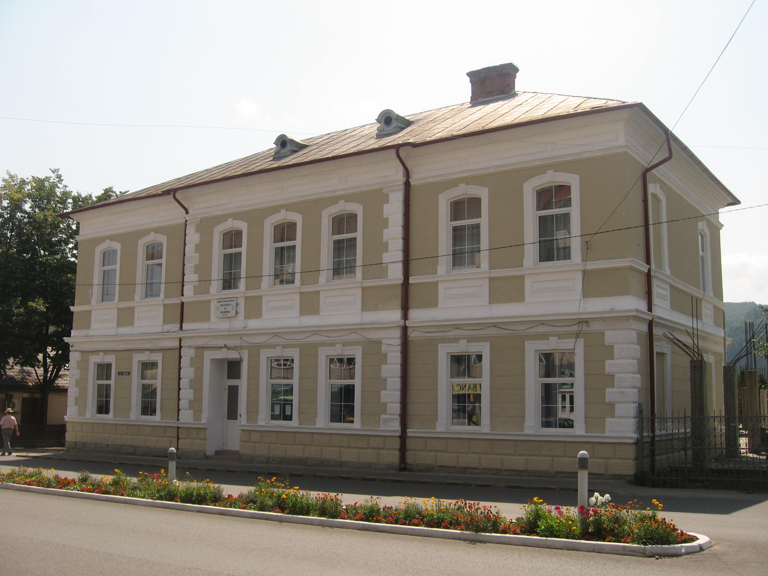 Şcoala nr.1 din Gura Humorului